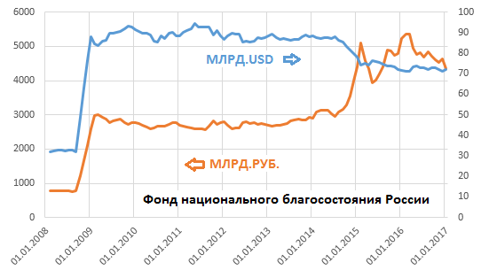 Фонд национального благосостояния России, динамика изменений 2008 2017